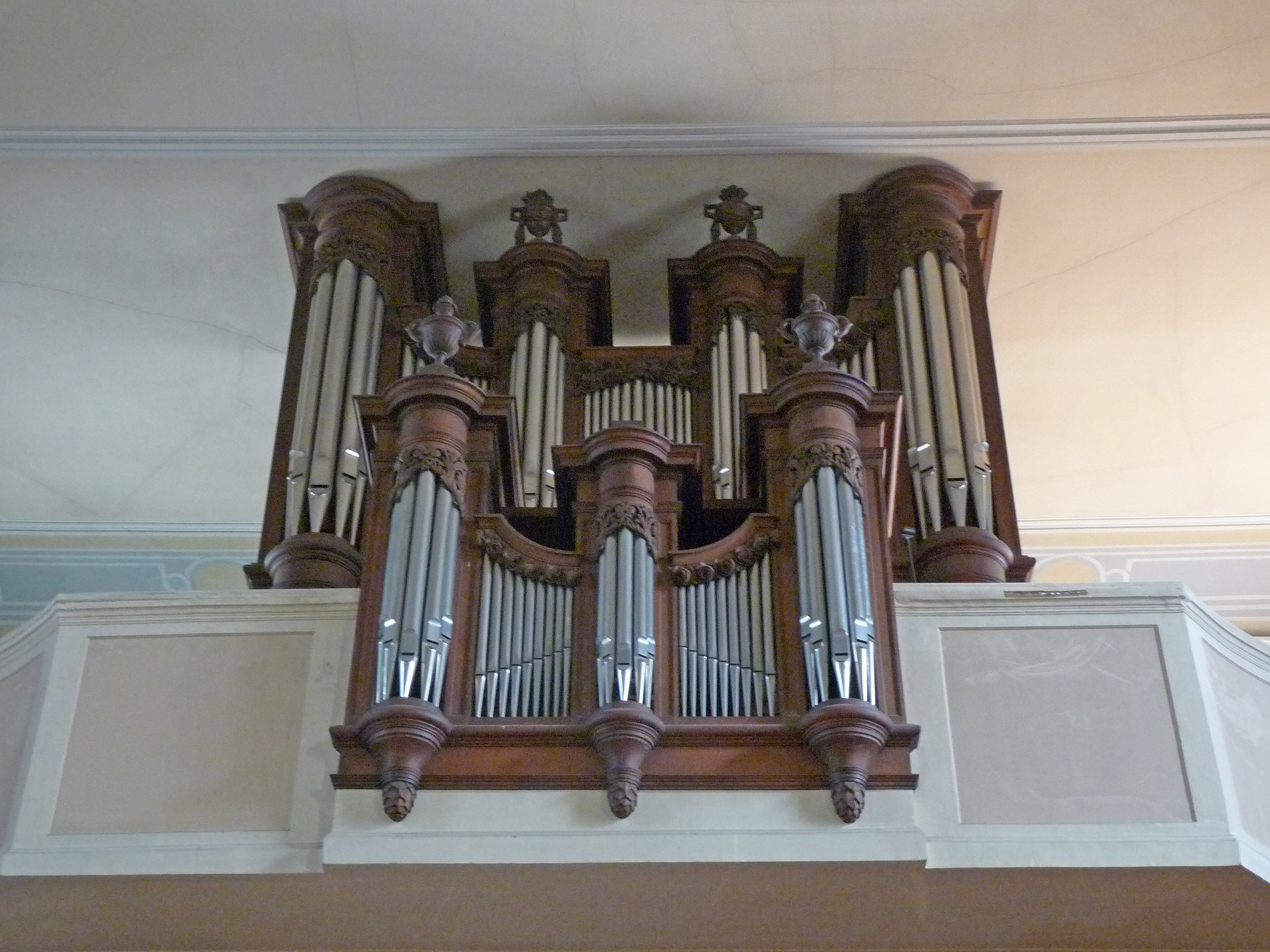 Oltingue (Haut-Rhin) : orgues des frères Callinet à l'église Saint-Martin. 1843, partie instrumentale classée Monument Historique en 1873